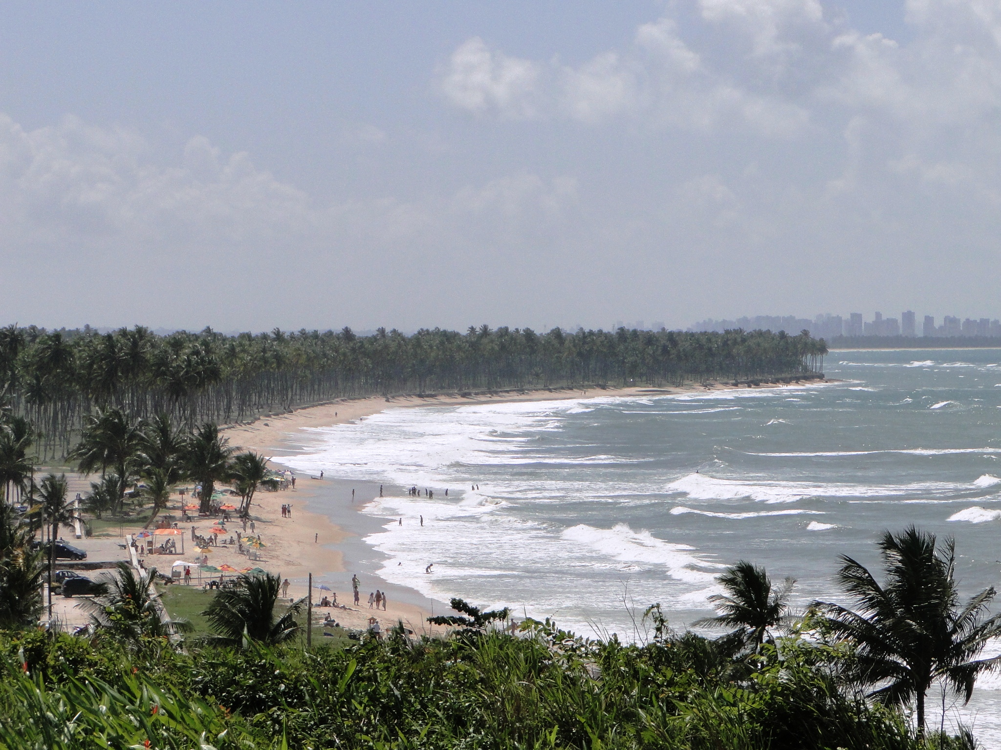 Praia do Paiva